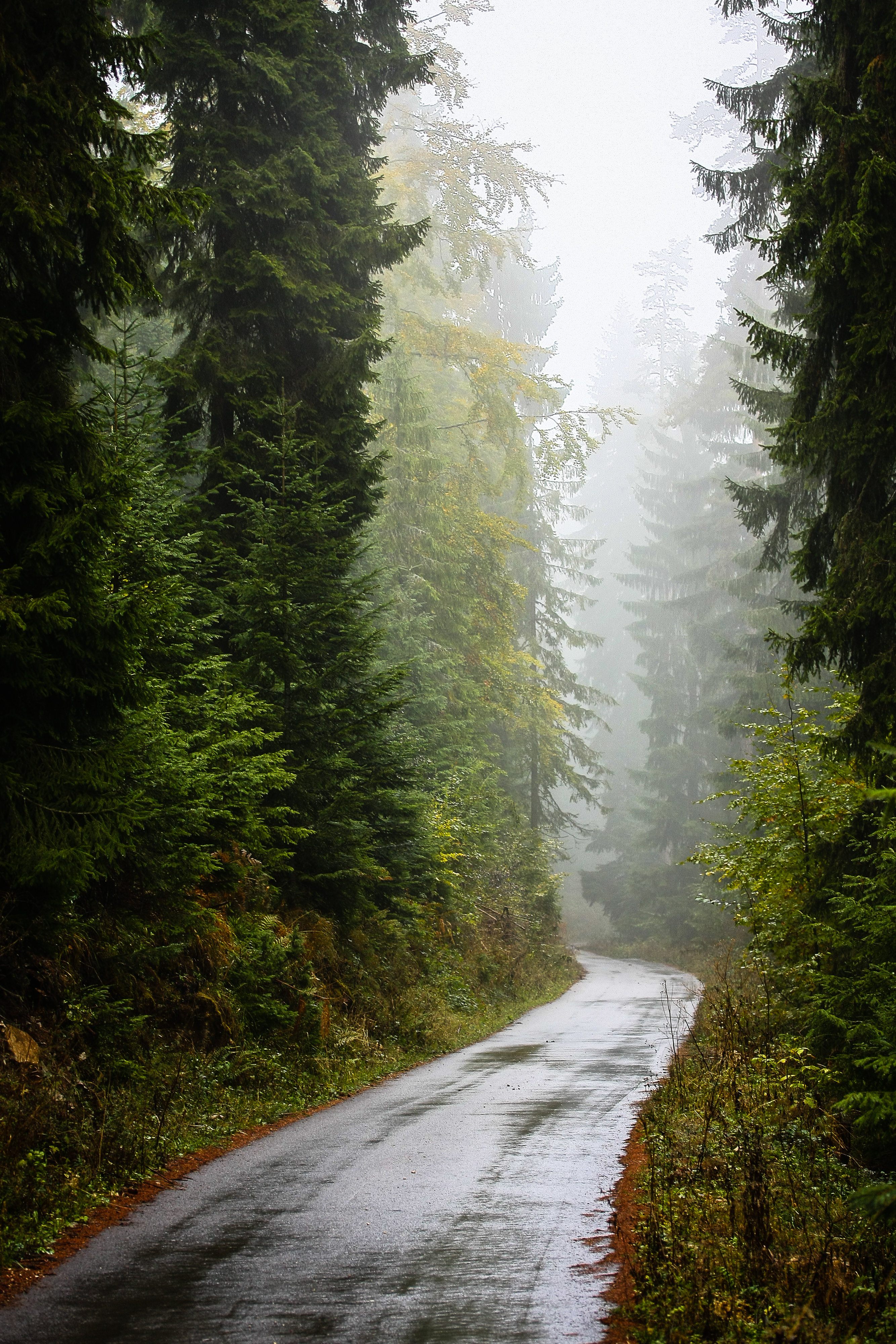 Na putu ka Borikama Посебни резерват природе Бокшаница, Рогатица ID добра: PPRP005